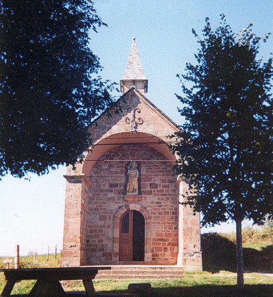 Date du cliché : septembre 2001.